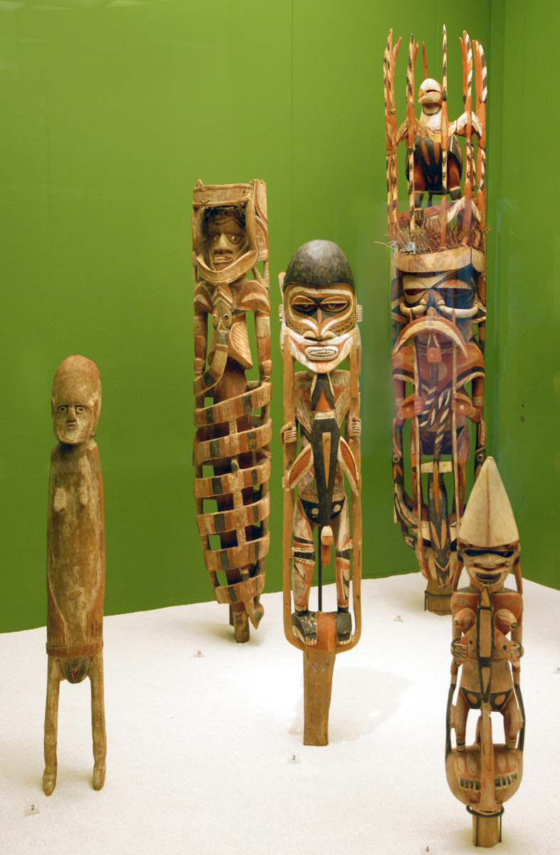 Sculptures de la culture Malanggan Nouvelle Irlande Salles de l'Océanie (Musée d'ethnographie, Berlin)